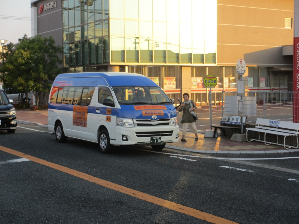 福岡県朝倉市の甘木中央バス停